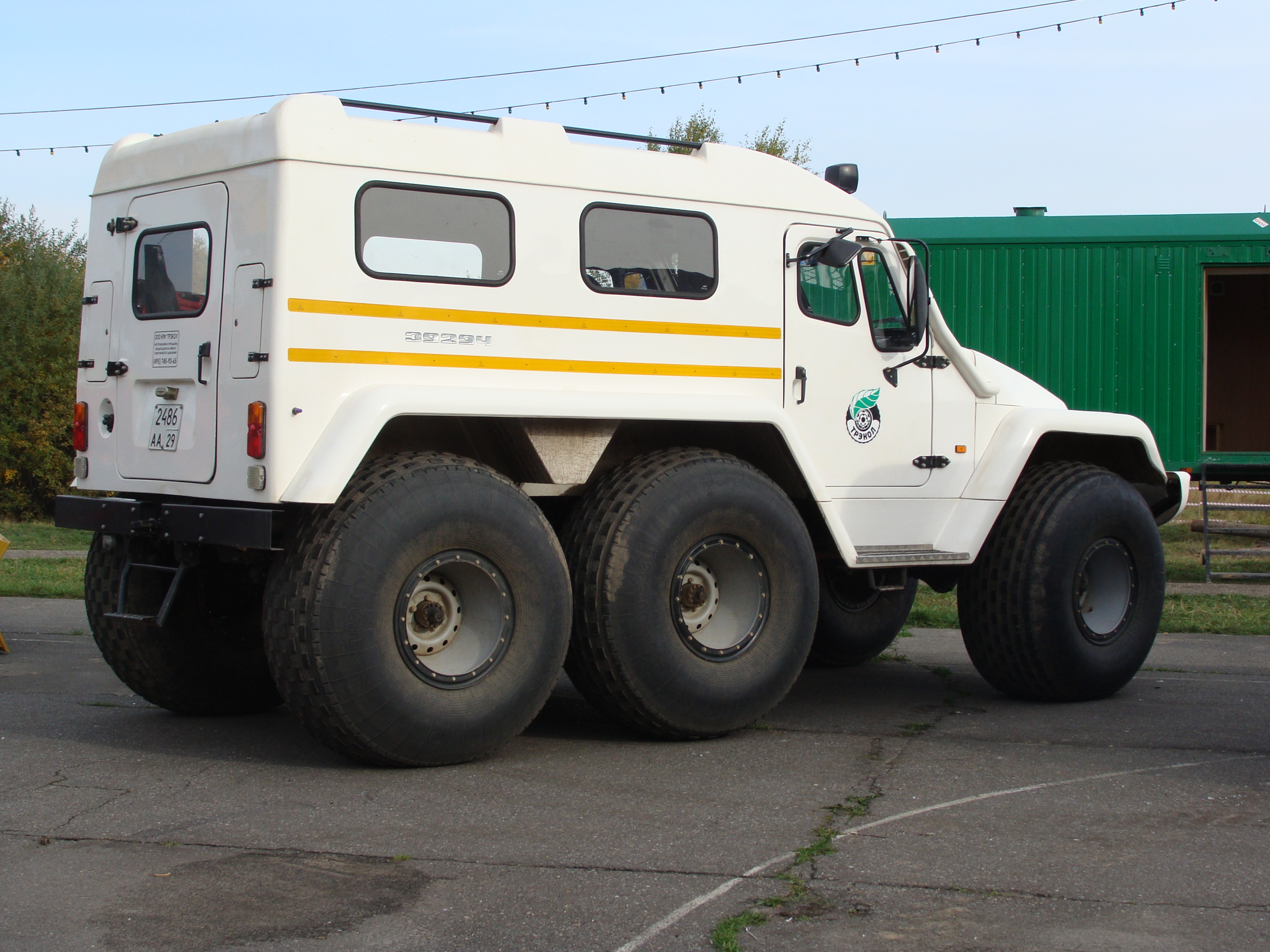 День работников леса. Коряжма 2010